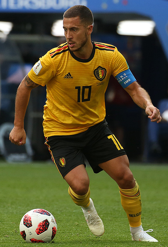 Сборная Бельгии впервые в истории завоевала бронзу ЧМ